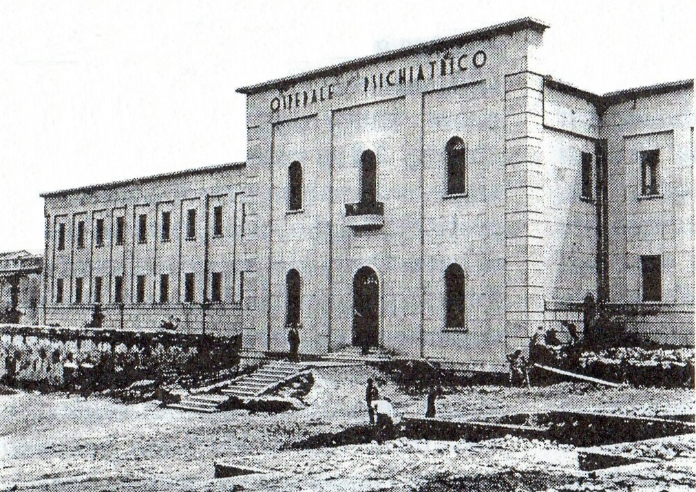 Manicomio di Girifalco anni '40 del '900